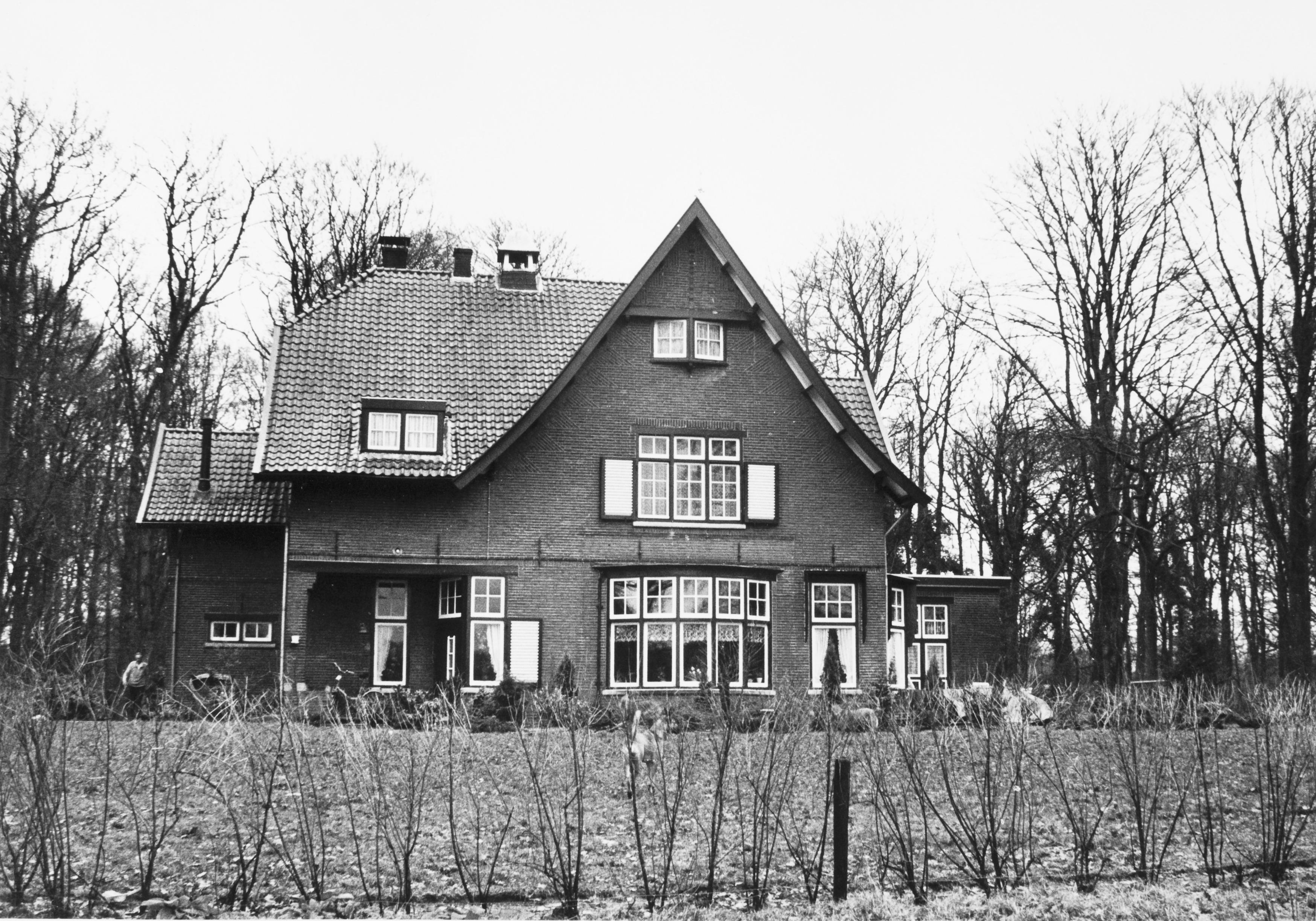 Hof te Espelo: Overzicht van de voorgevel (opmerking: Afdrukken verkregen via Ypie Attema, oud medewerkster van de Rijksdienst voor de Monumentenzorg.)